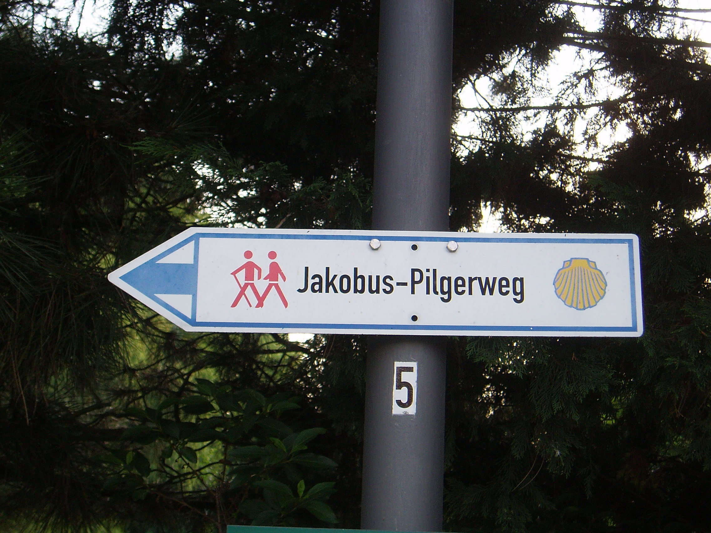 Wegweiser bayrisch-schwäbischer Jakobsweg